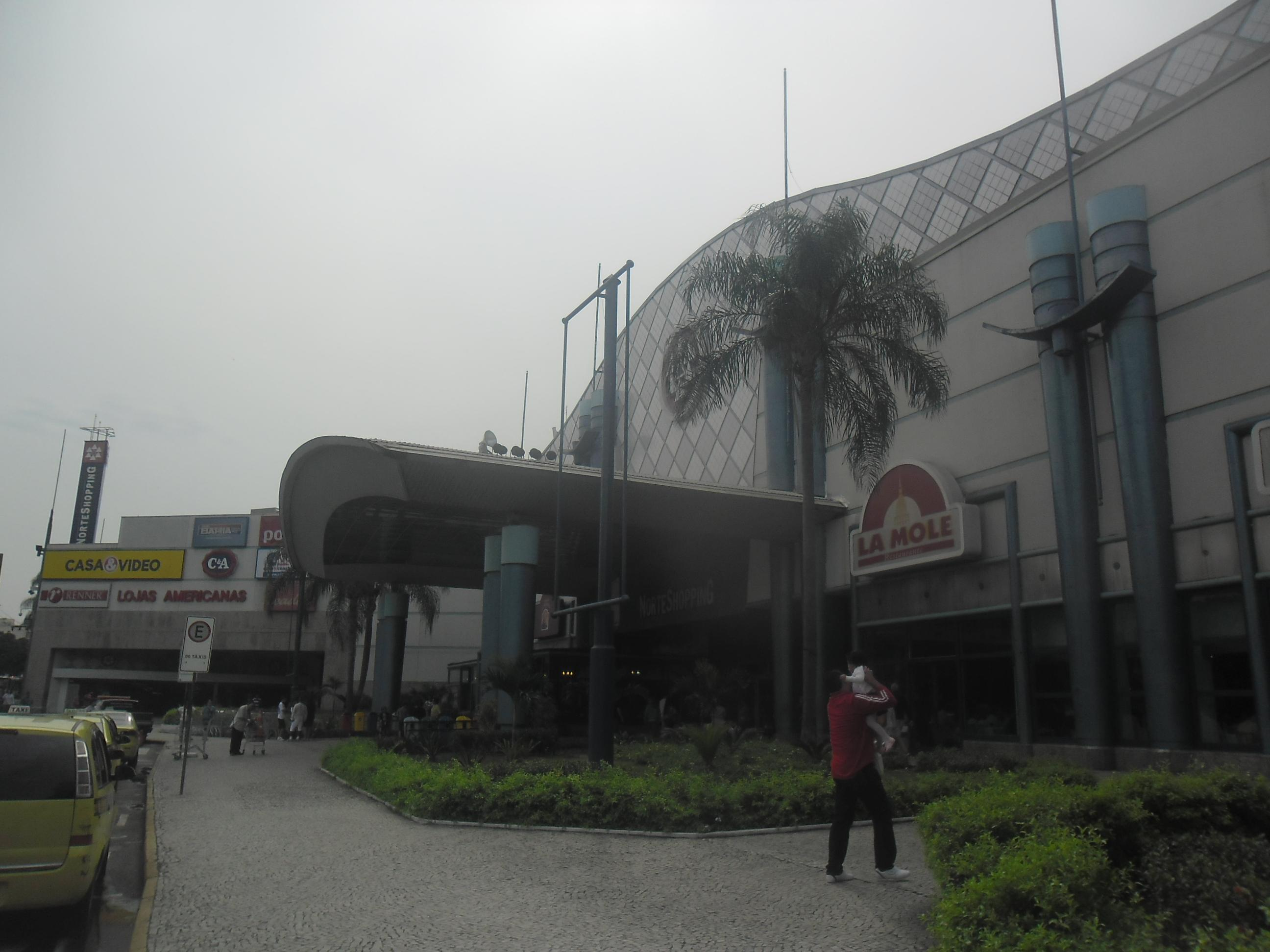 NorteShopping.